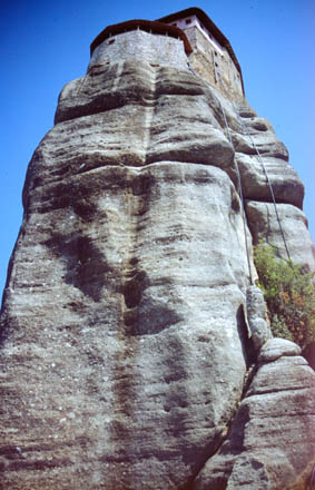 Meteora / Griechenland